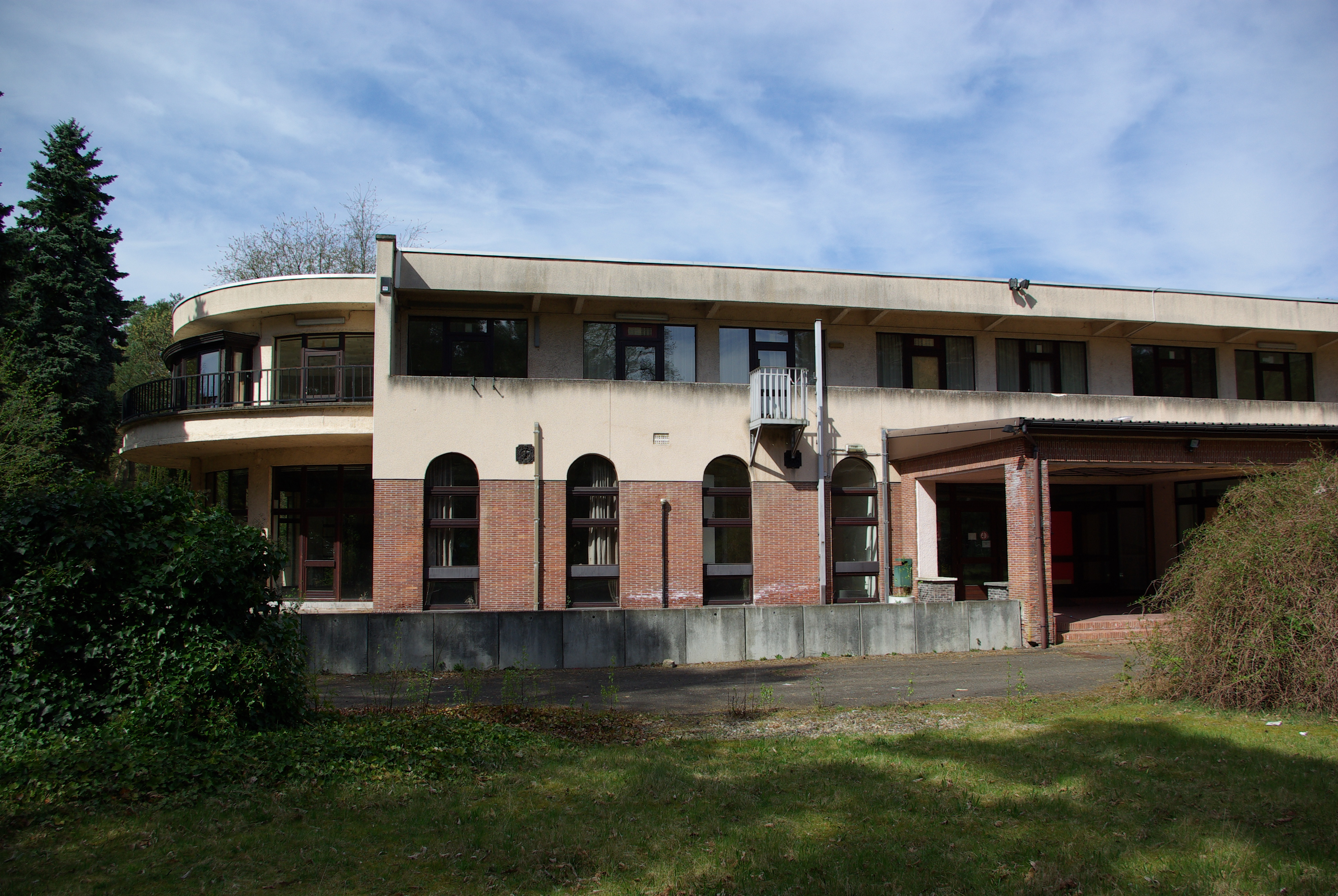 Le Grand Veneur, detail